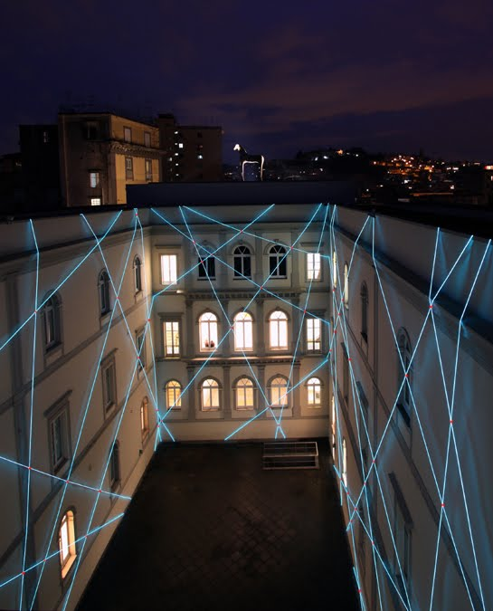 La "rete Elettro-Luminescente" di Bianco-Valente nel cortile interno del Museo Madre di Napoli (2009)